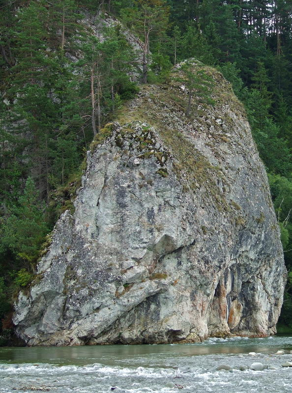 Przełom Rzeki Białki